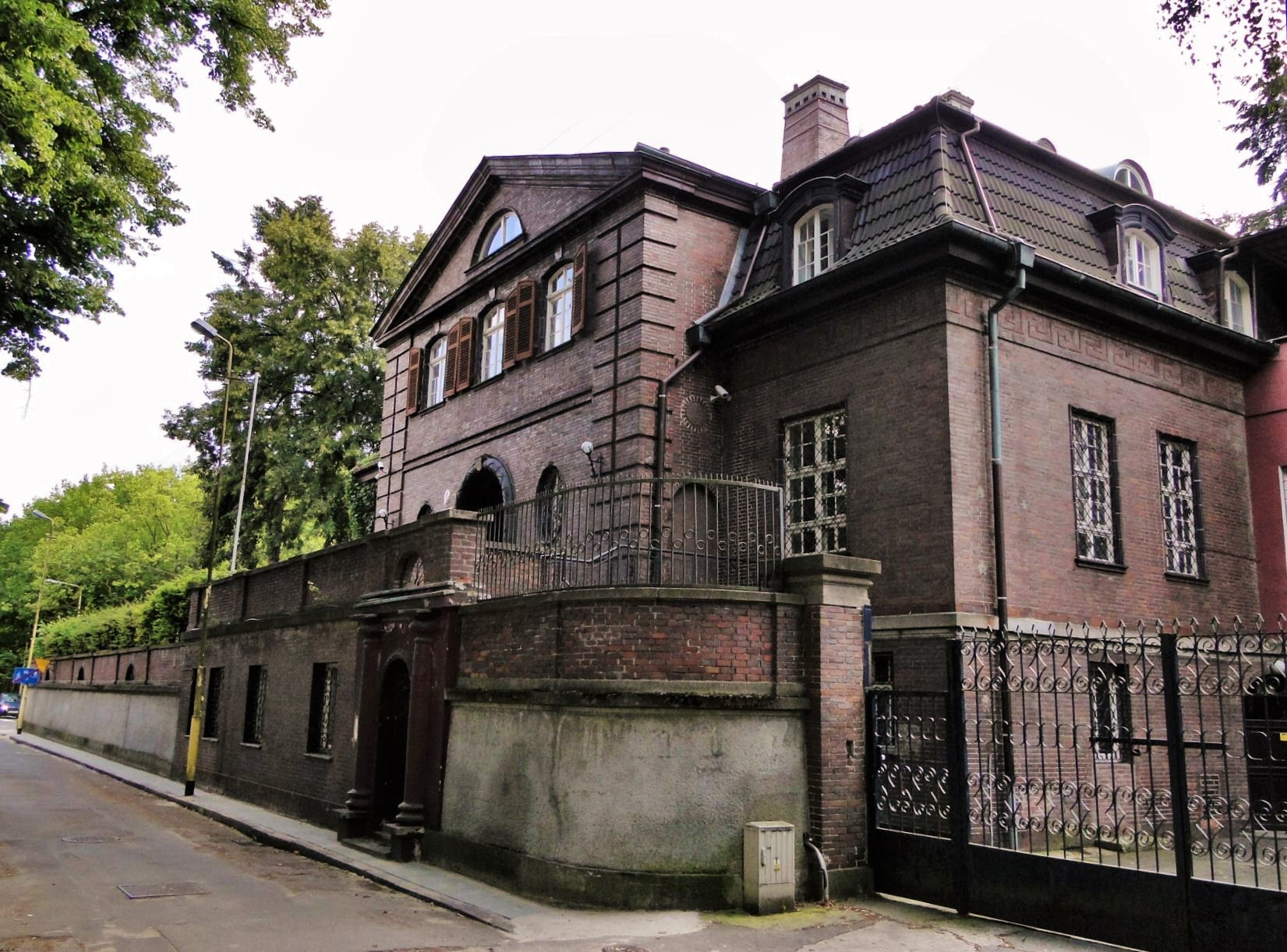 Willa przy ul. Piotra Skargi 14 w Szczecinie (zabytek nr rejestr. 121)